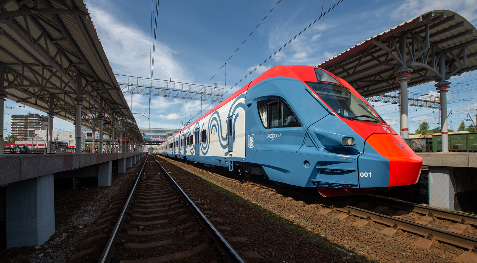 Электропоезд ЭГ2Тв-001 на станции Солнечная Киевского направления МЖД